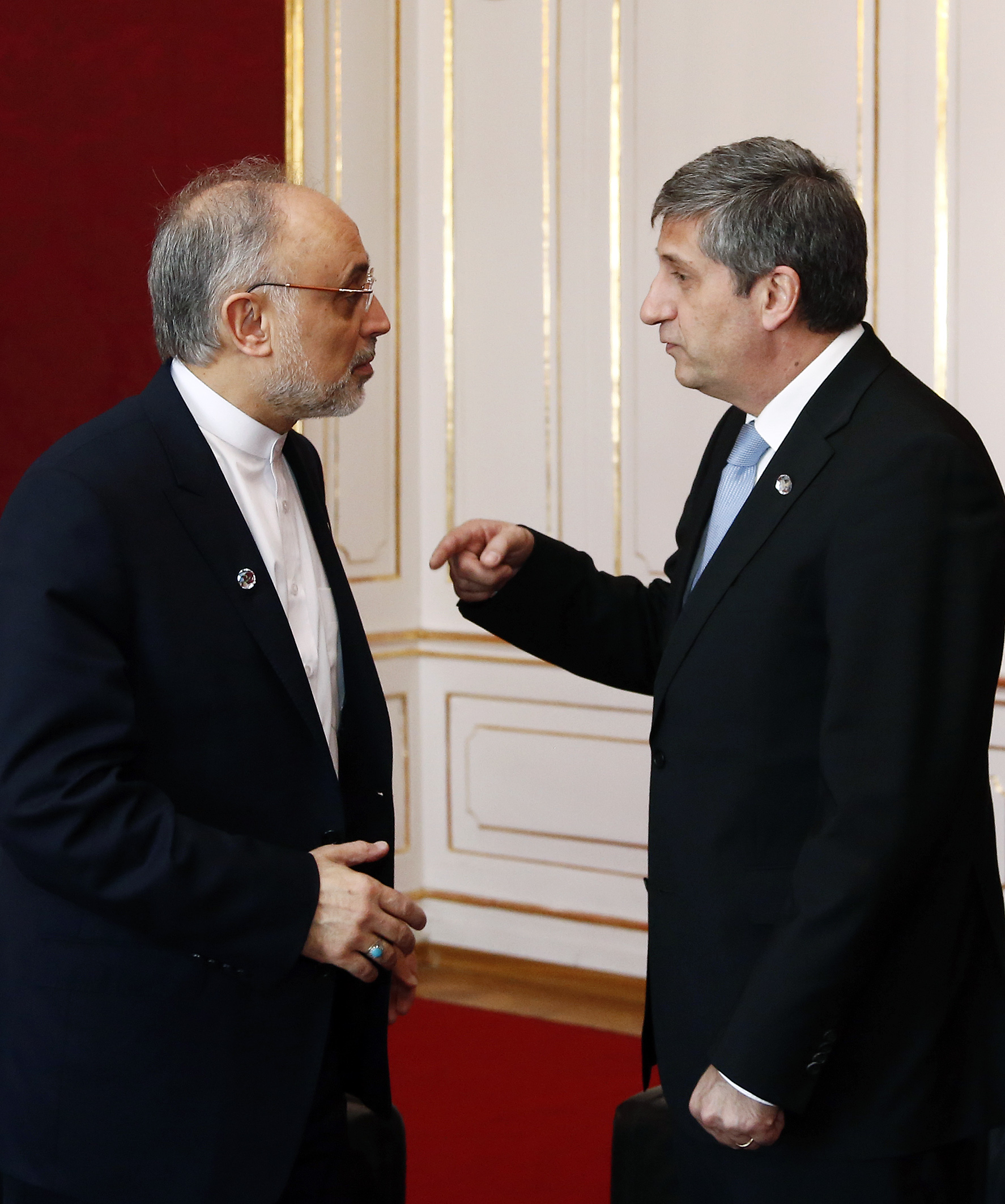 5. Global Forum der Allianz der Zivilisationen der Vereinten Nationen in Wien, Außenminister Michael Spindelegger trifft den Außenminister des Iran, Ali Akbar Salehi. Wien, 28.02.2013, Foto: Dragan TATIC